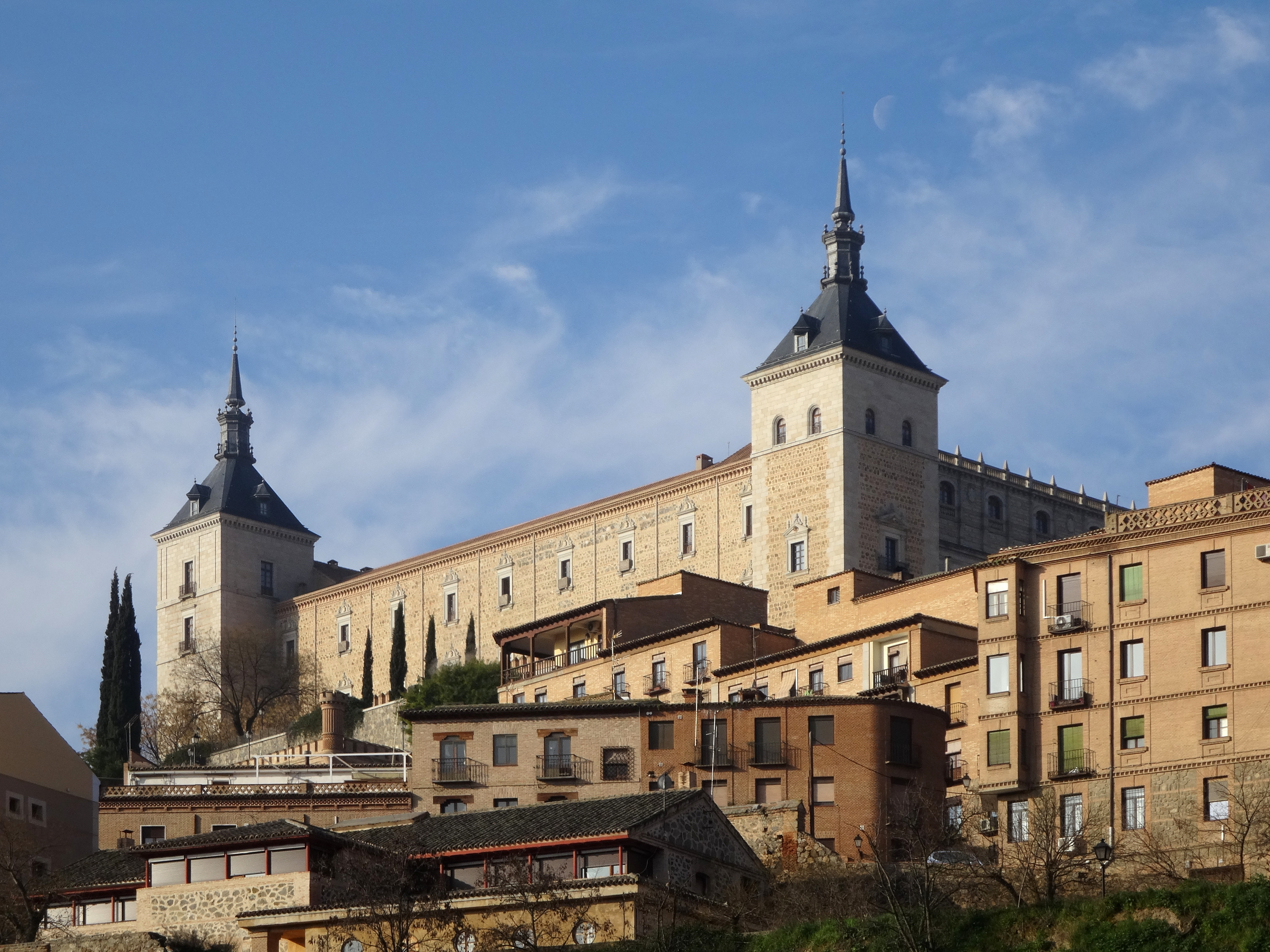 Alcázar de Toledo (España).